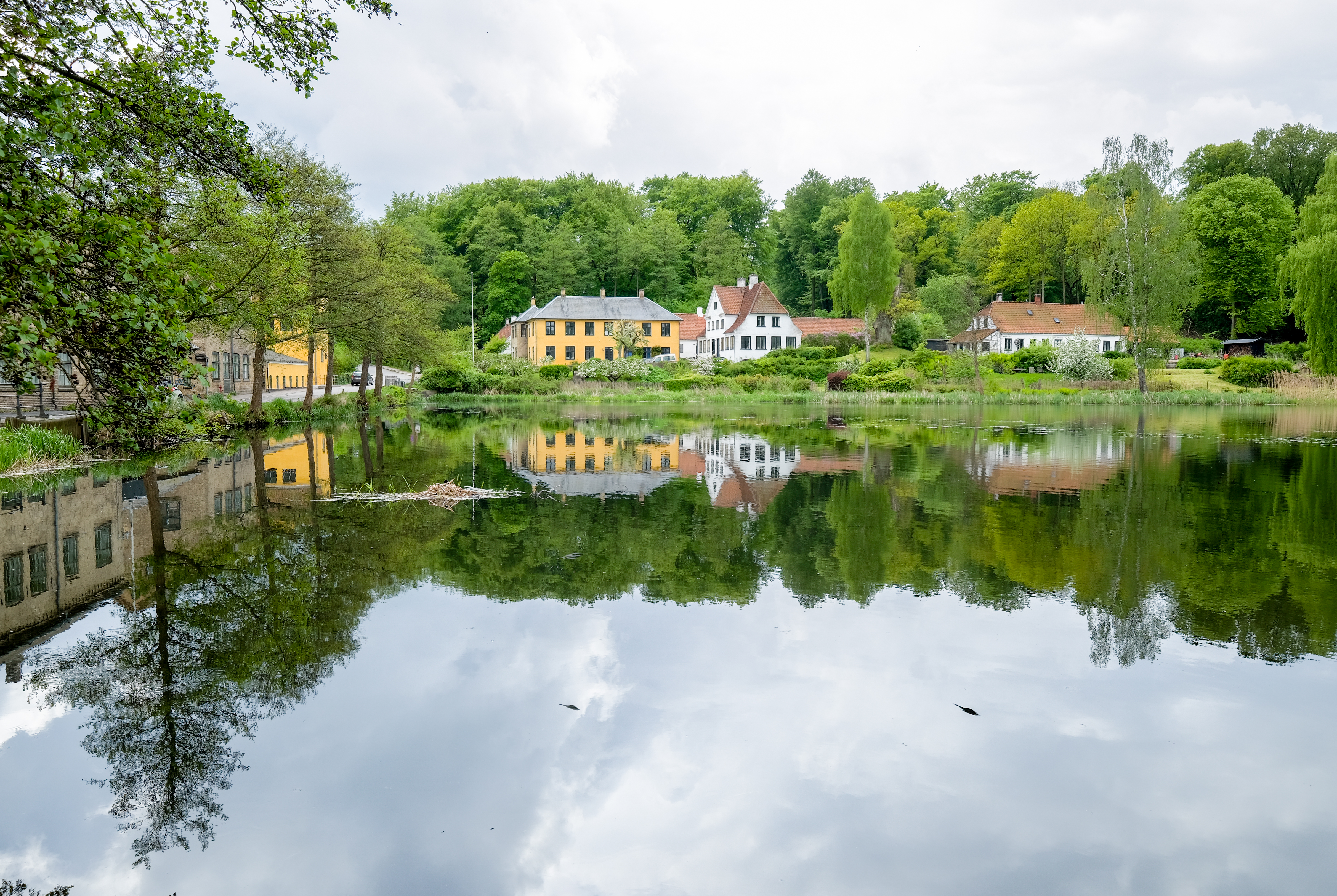 Raadvad, North Zealand, Denmark